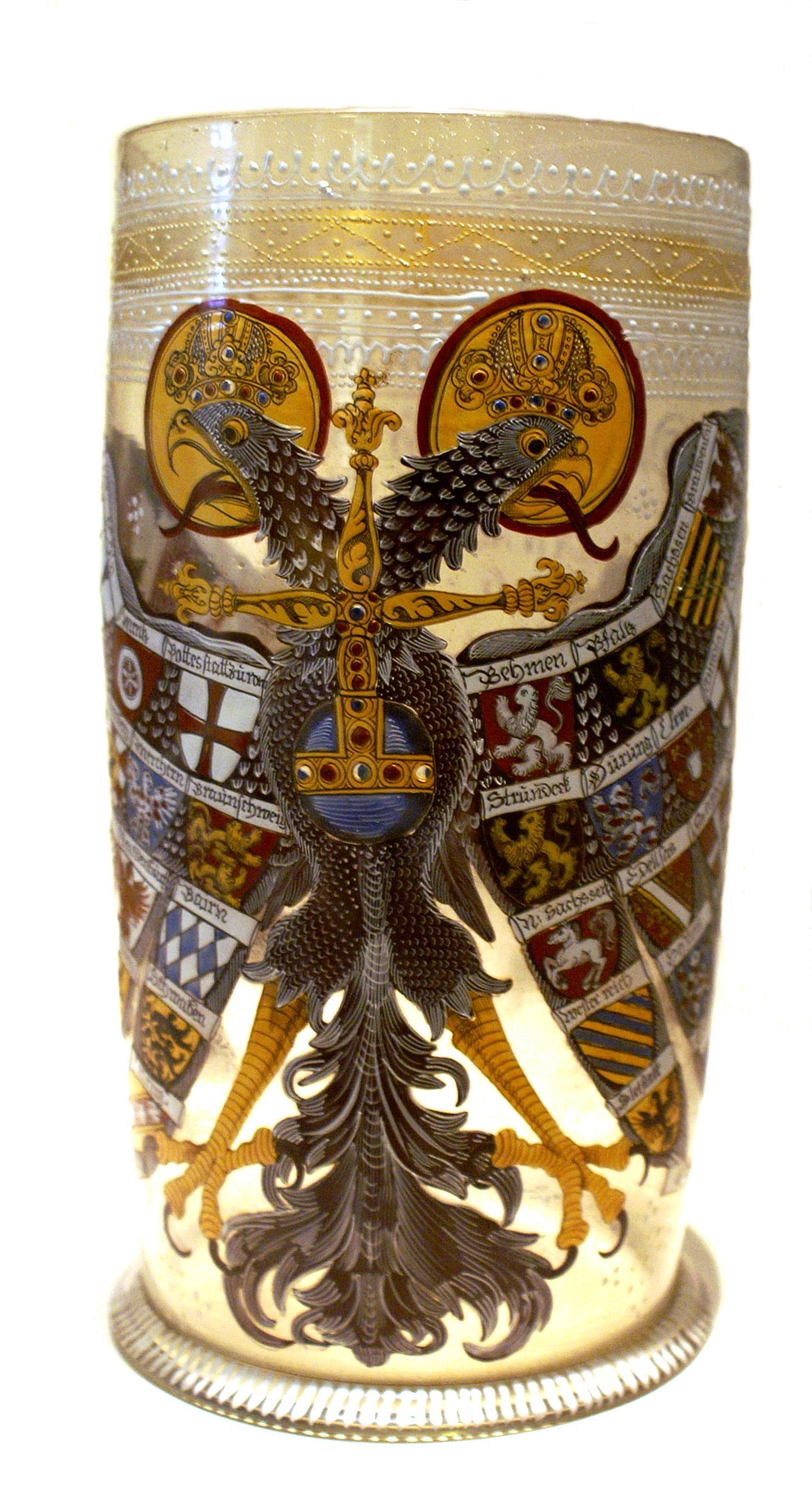 Reichsadlerhumpen, Exemplar im Deutschen Historischen Museum in Berlin